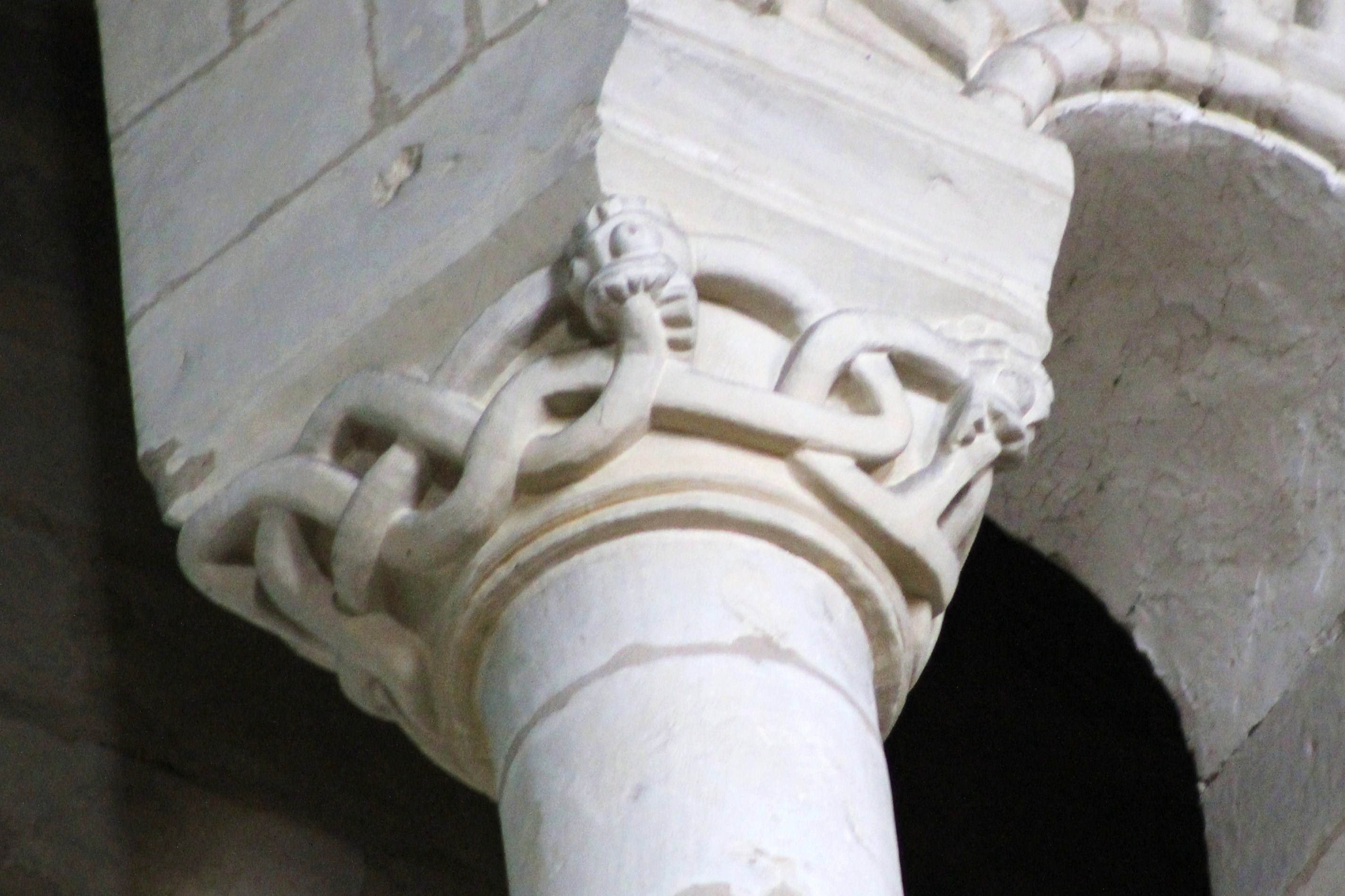 Chapiteau de la nef représentant un serpent fantastique nommé Jörmungand inspiré de la mythologie nordique dans l'église Saint-Étienne à Caen (Calvados)